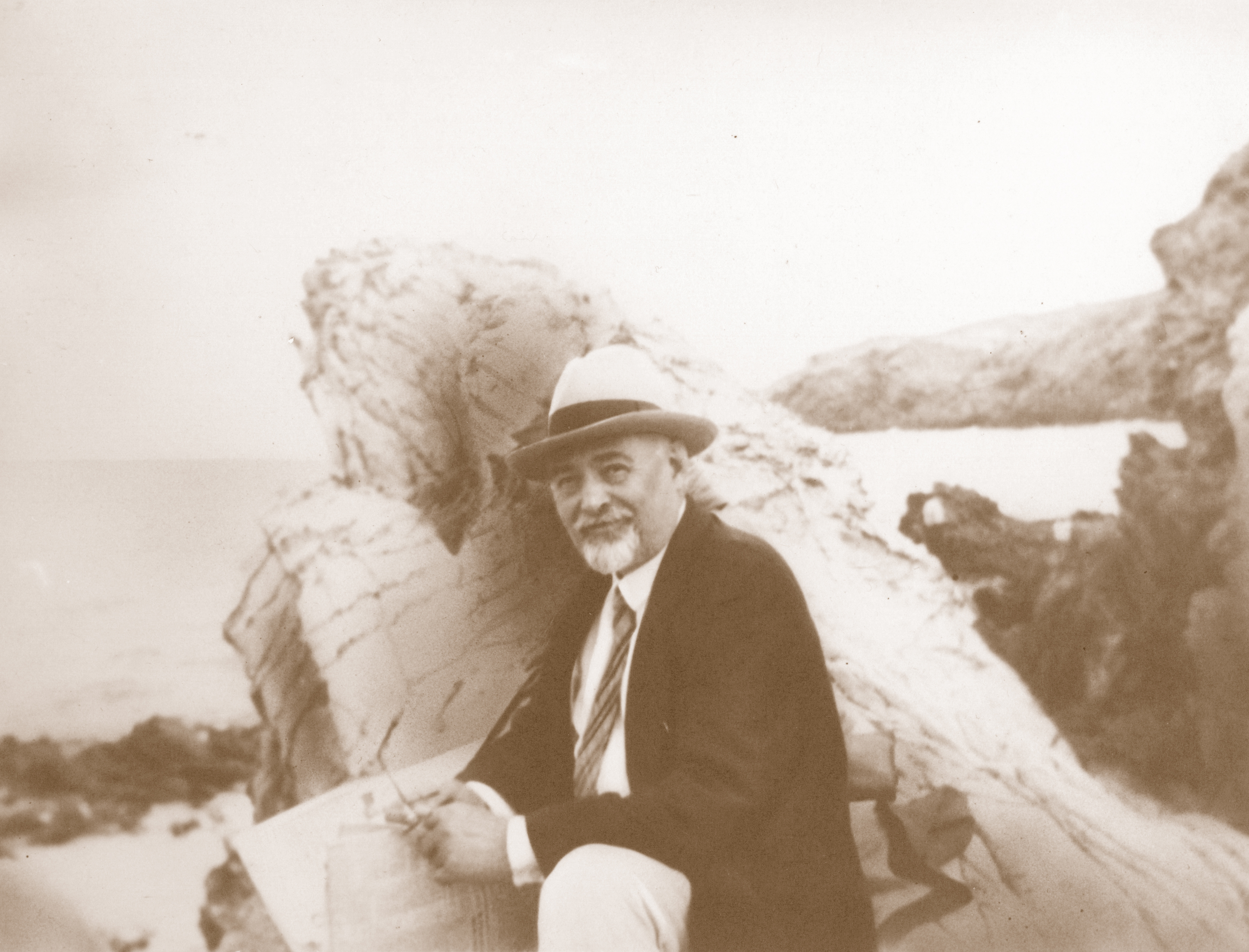 Cliché anonyme représentant l'architecte Paul Bigot (1870-1942) en visite sur la côte normande. Retouché, ce cliché date des années 1930. Date : vers 1930 Auteur : anonyme Descriptif : photographie Dimension : 23,1 x 17,9 cm Fichier : UNICAEN_ PB_MRSH_A2_13 Localisation : MRSH Conditionnement : Boîte A